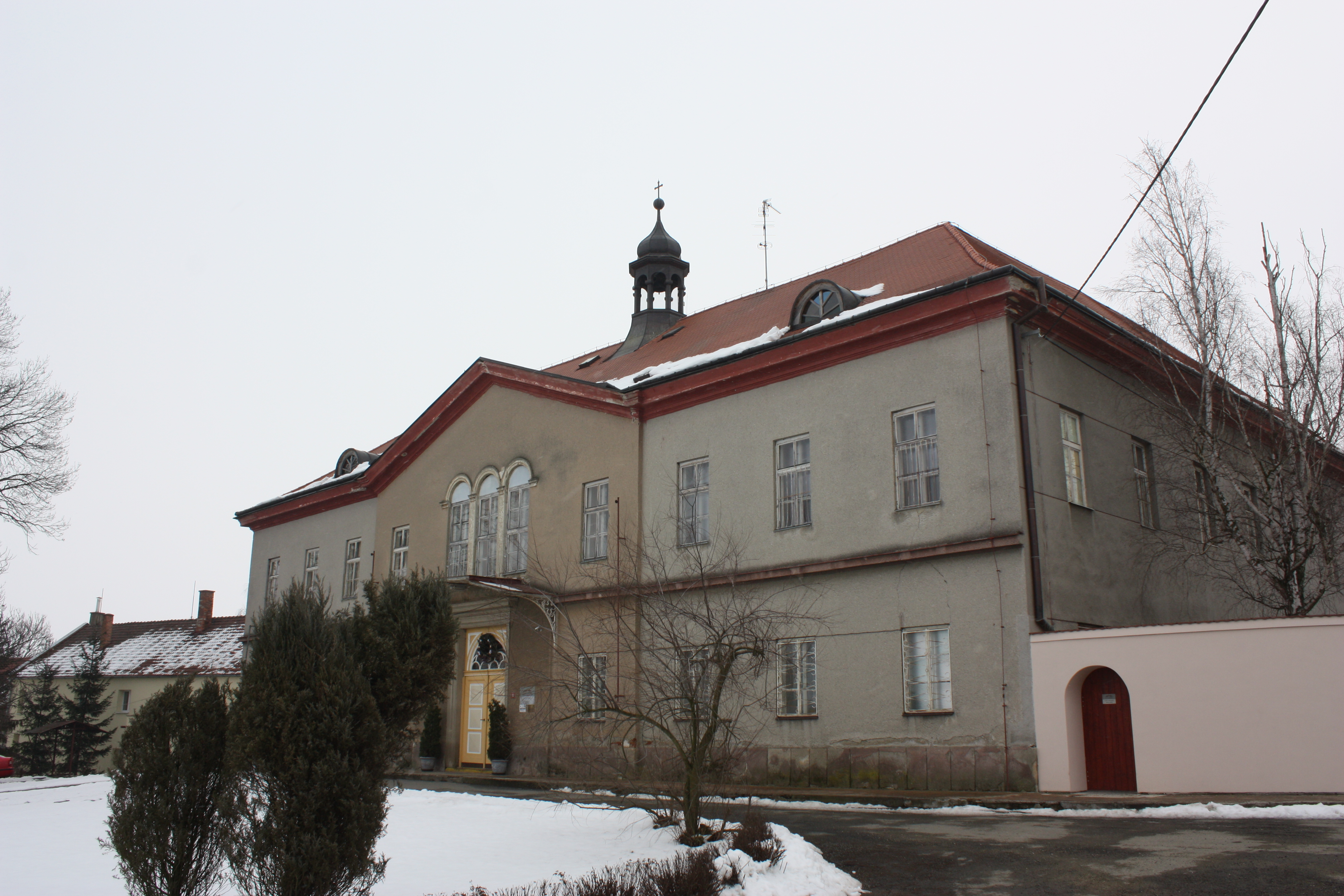 Zámek Víceměřice, Víceměřice 32